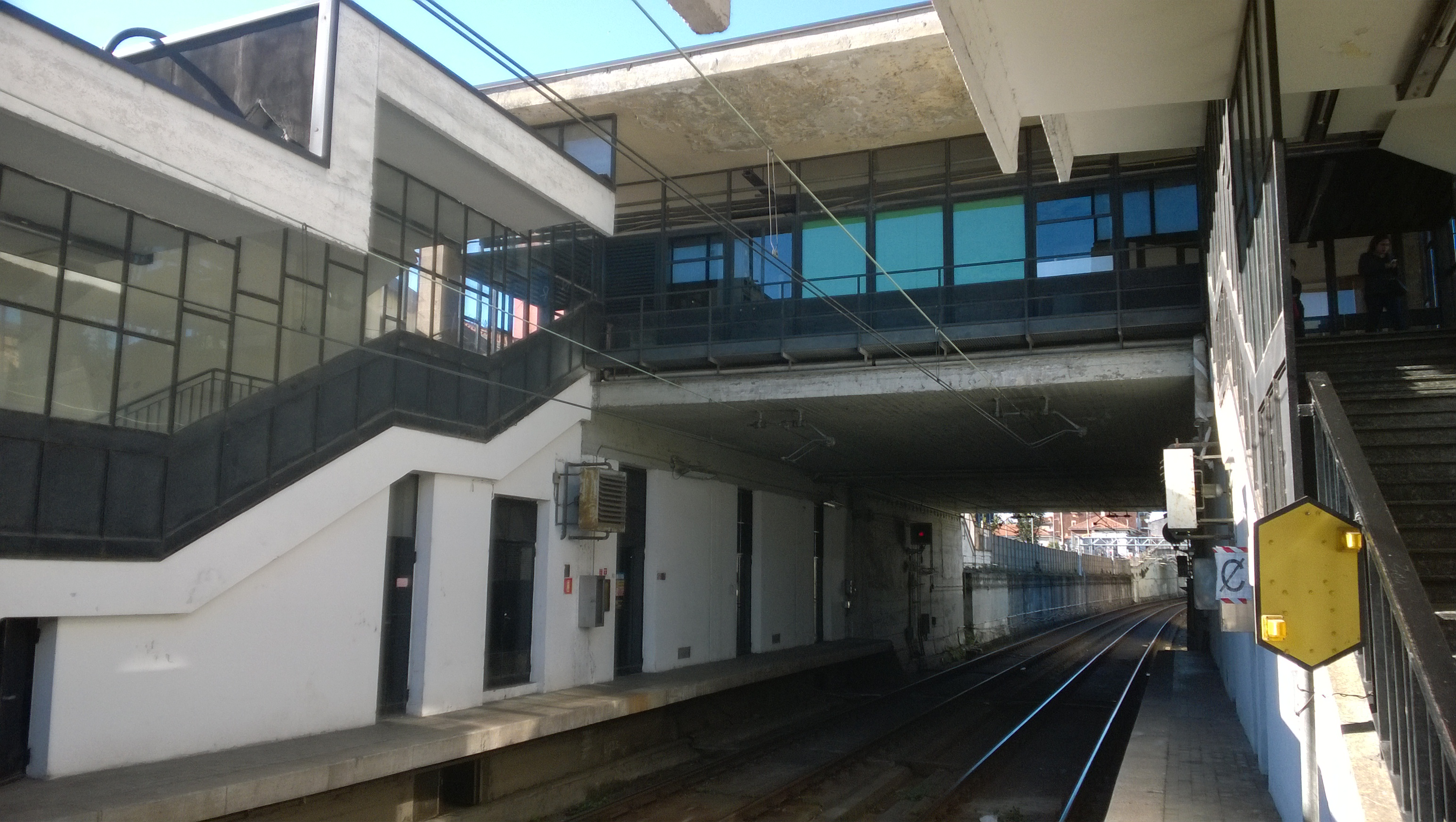 Il fabbricato viaggiatori della stazione di Vimodrone della linea M2 della metropolitana di Milano.